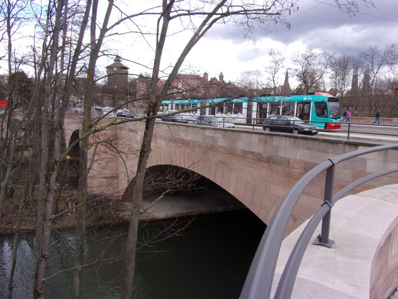 Hallertorbrücke mit Straßenbahnzug Nr. 1121 (Typ GT8N), im Hintergrund der Westtorturm und die Burg